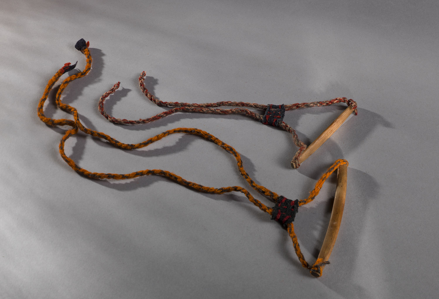 To melkekjevler for reinsdyrkalver. De ble brukt til å hindre kalvene å die. Gjenstandene er fra Åfjord i Trøndelag og er innlevert i 1957 av Bertrand M. Nilsen, reisesekretær i Norsk Samemisjon. Utstilt i "Hvem eier historien?" 2017. E 347 Foto: Åge Hojem/NTNU Vitenskapsmuseet Tekst: Birgitta Berglund/NTNU Vitenskapsmuseet